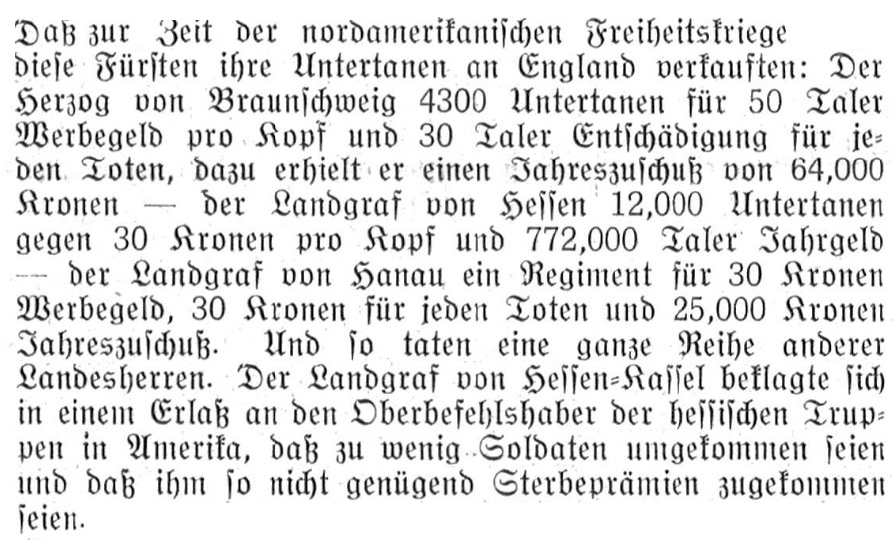 Deutsche Fürstenabfindungs Rechnung für die deutsche Beteiligung am Amerikanischen Unabhängigkeitskrieg von 1775 bis 1783. Berner Wochen Zeitung, 1926.